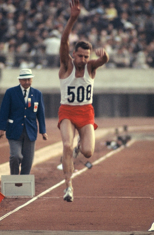 Józef Szmidt, 1964 Olympics